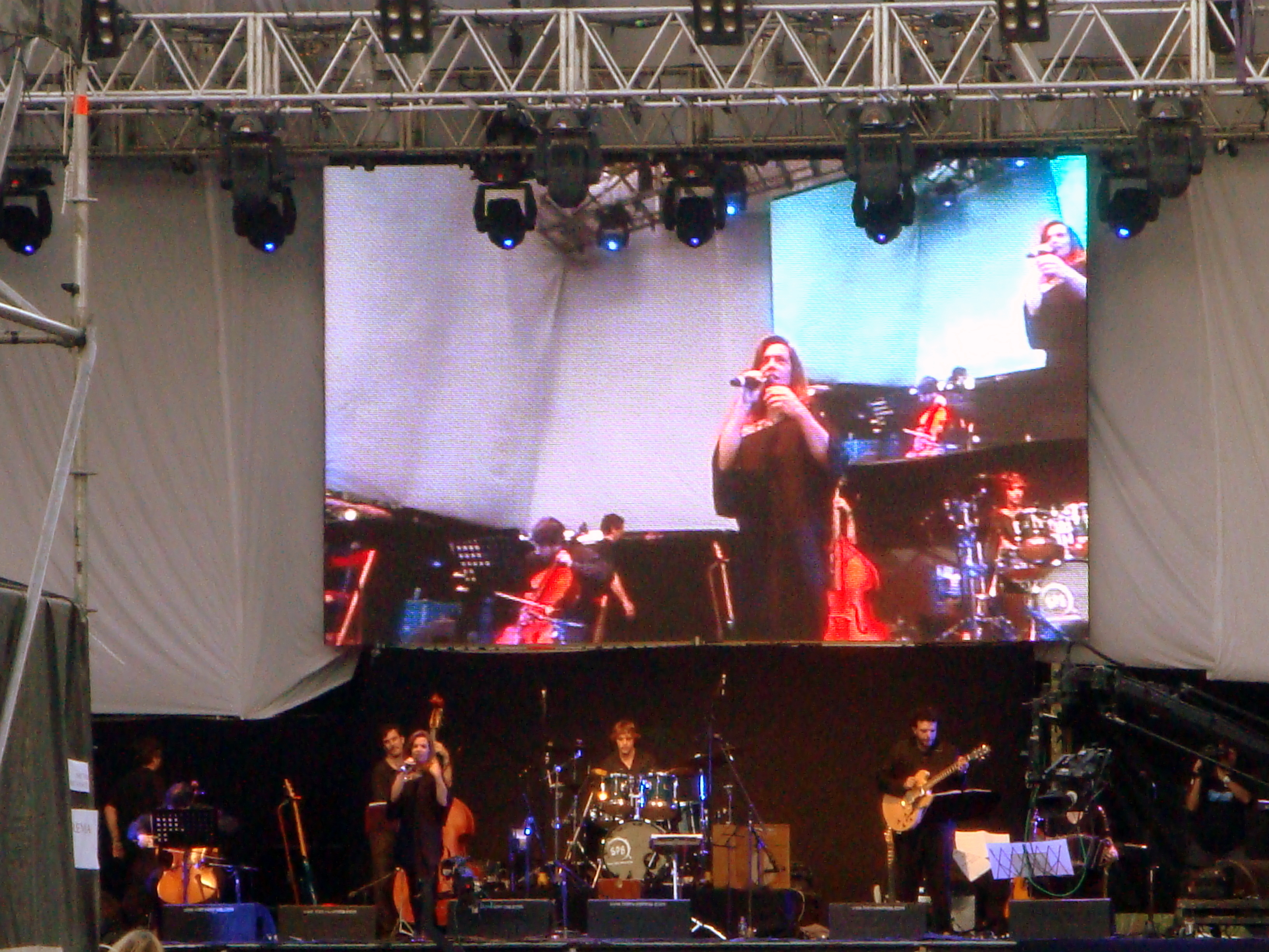 Sandra Mihanovich durante un recital en Buenos Aires, el 1º de mayo de 2010